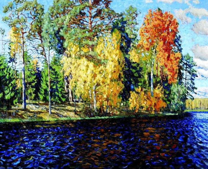 Лесное озеро. Золотая осень (Синяя вода)